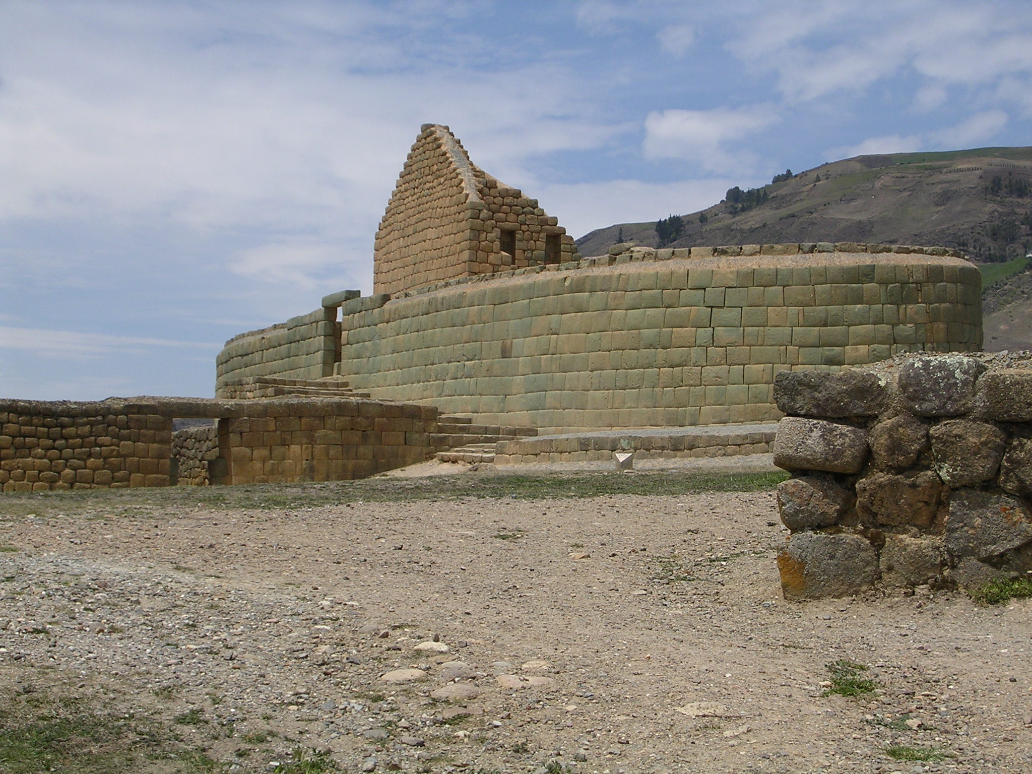 Ingapirca ruins in Ecuador. The elliptical usnu.